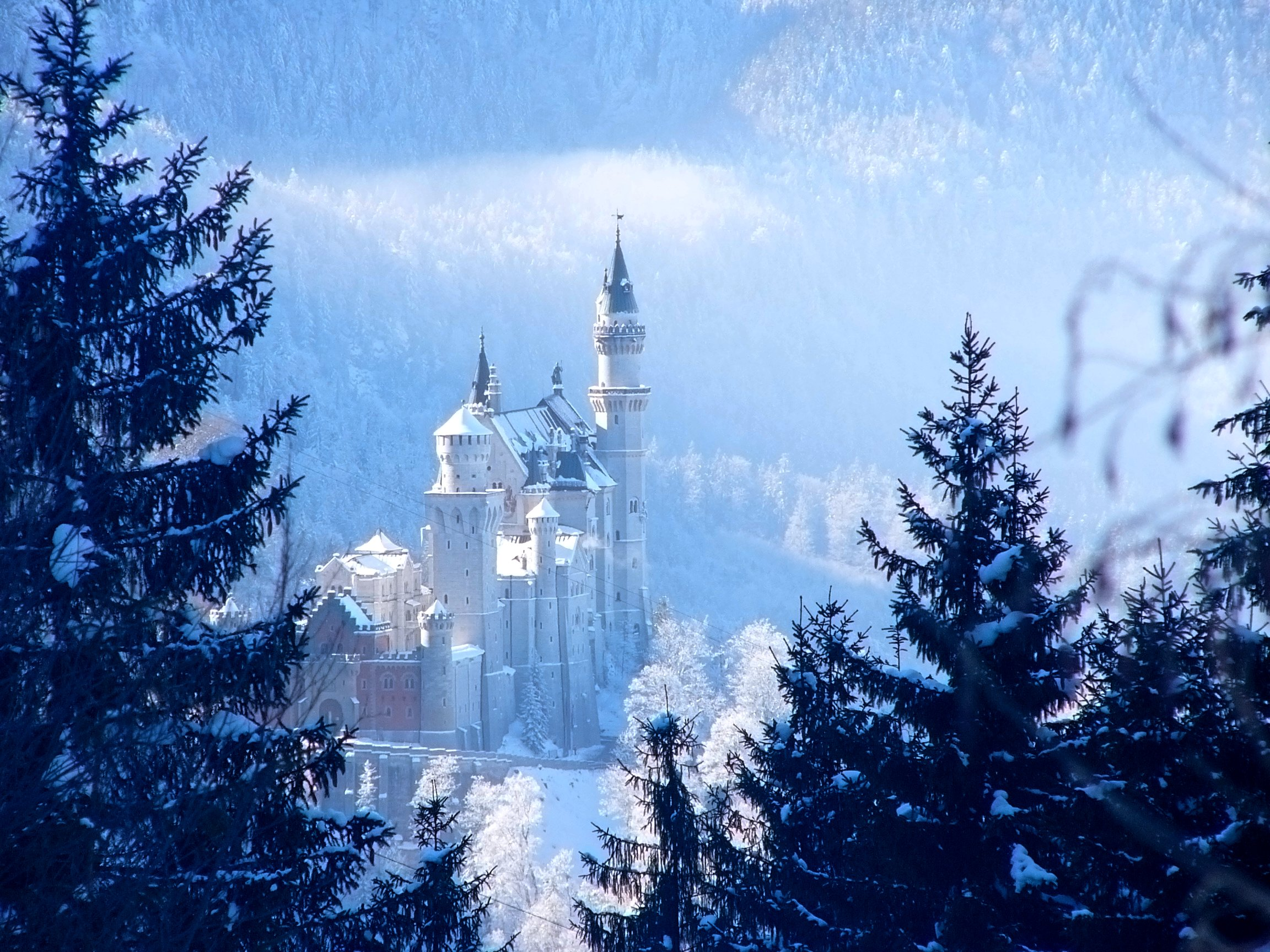 Schloss Neuschwanstein im Winter.